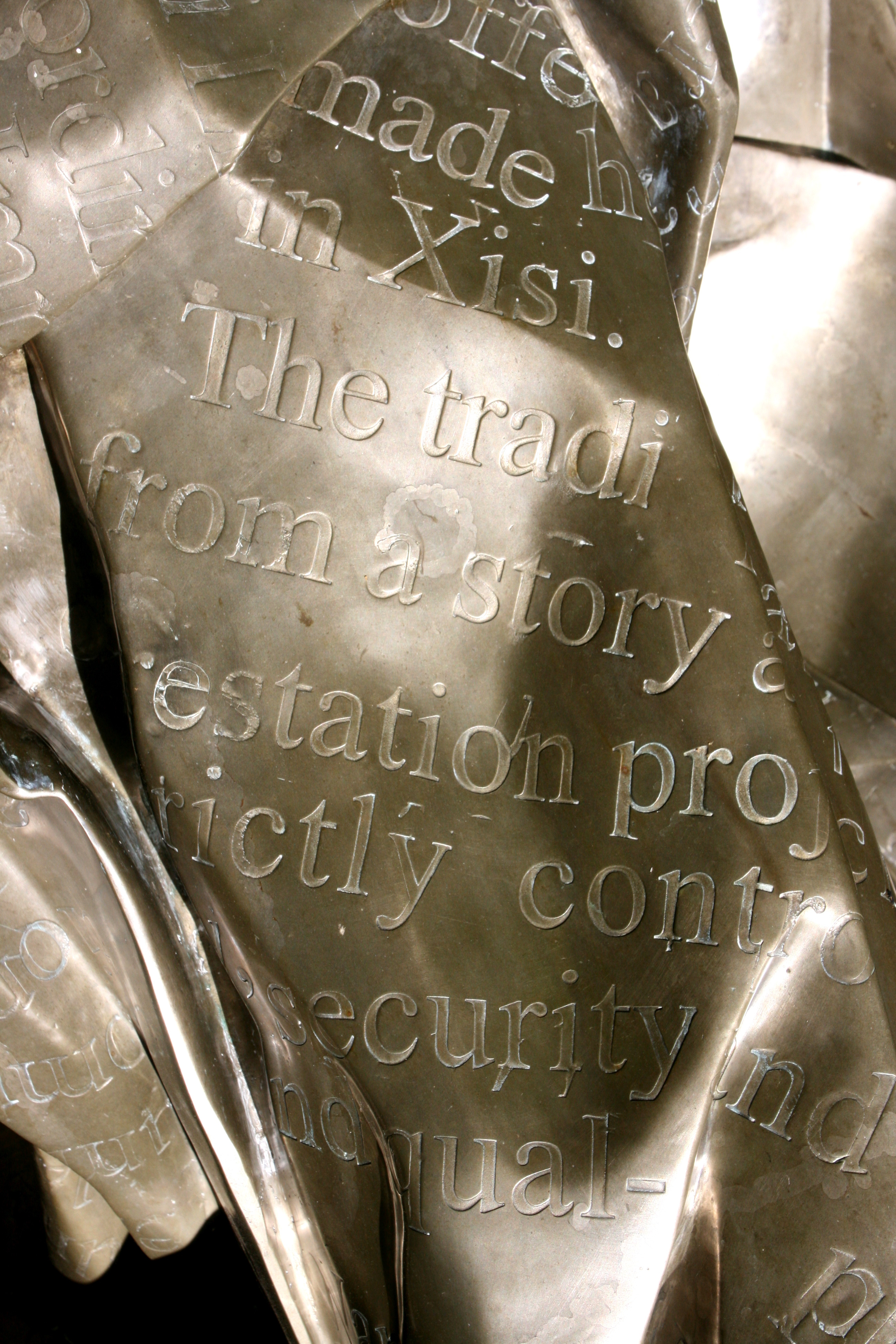 „China Daily“ von Wang Du, Rathauspark in Viersen